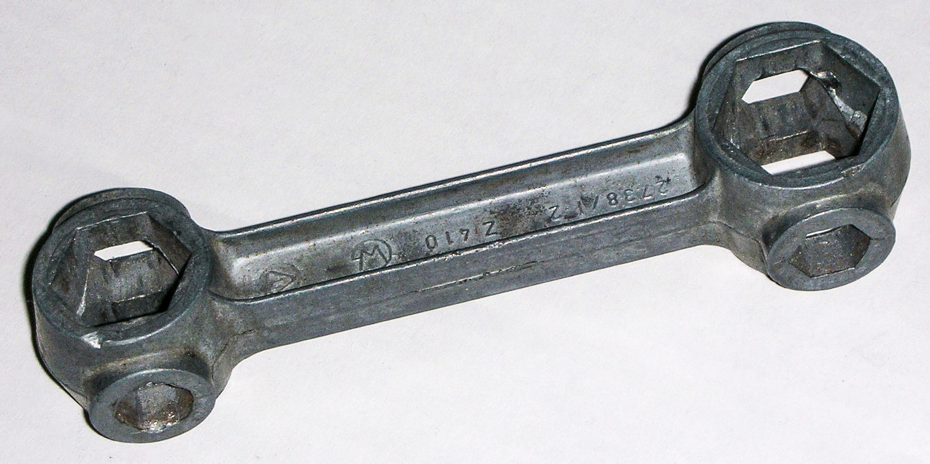 Der "Knochen" ist ein Schraubschlüssel, bei dem mehrere Größen und Formen in einem Werkzeug vereint sind. Er ist oft Bestand von Fahrradreparatursätzen.